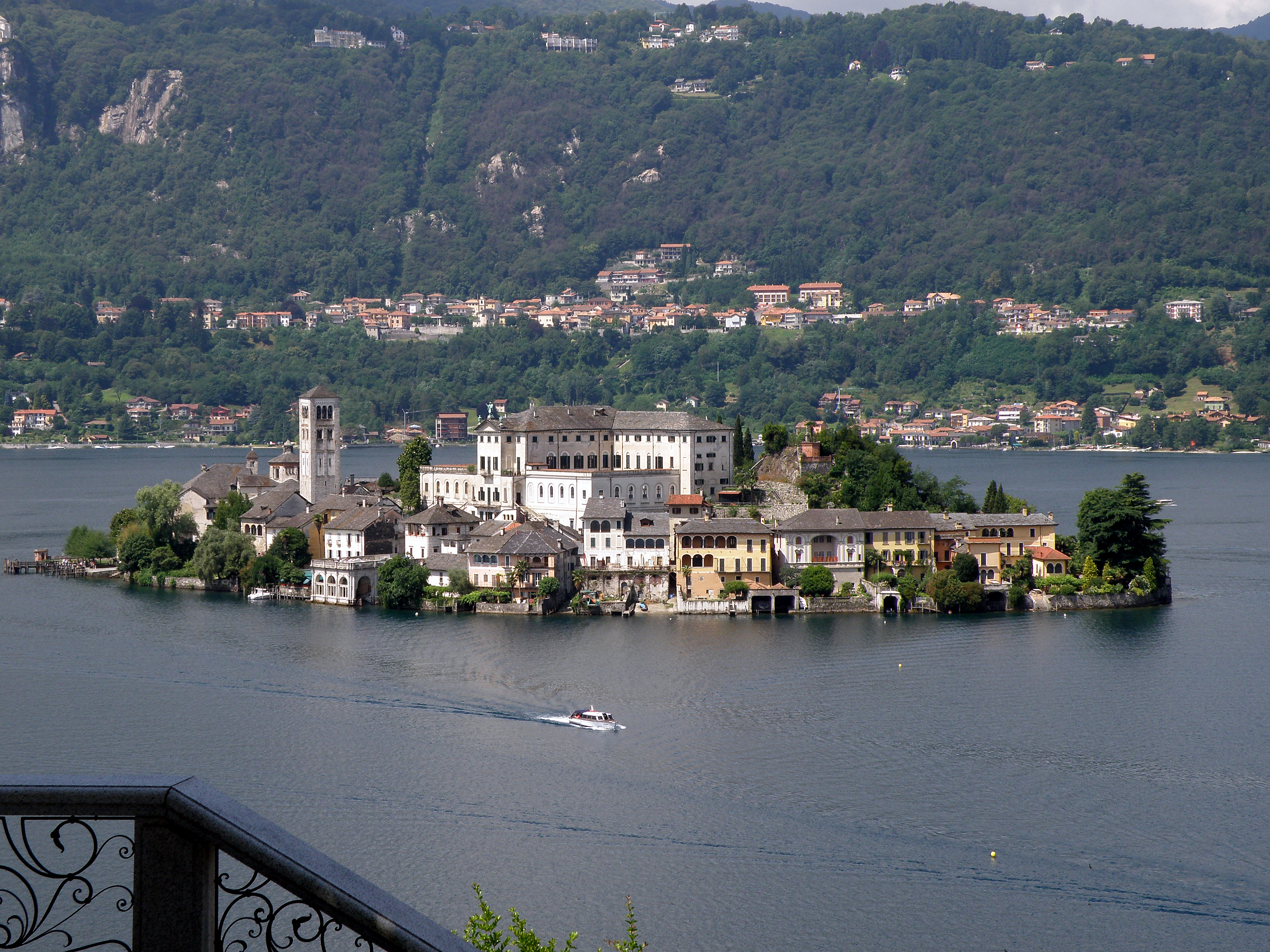 Orta San Giulio (NO). Isola San Giulio, nel Lago di Orta. Vista dalla Via Gemelli.